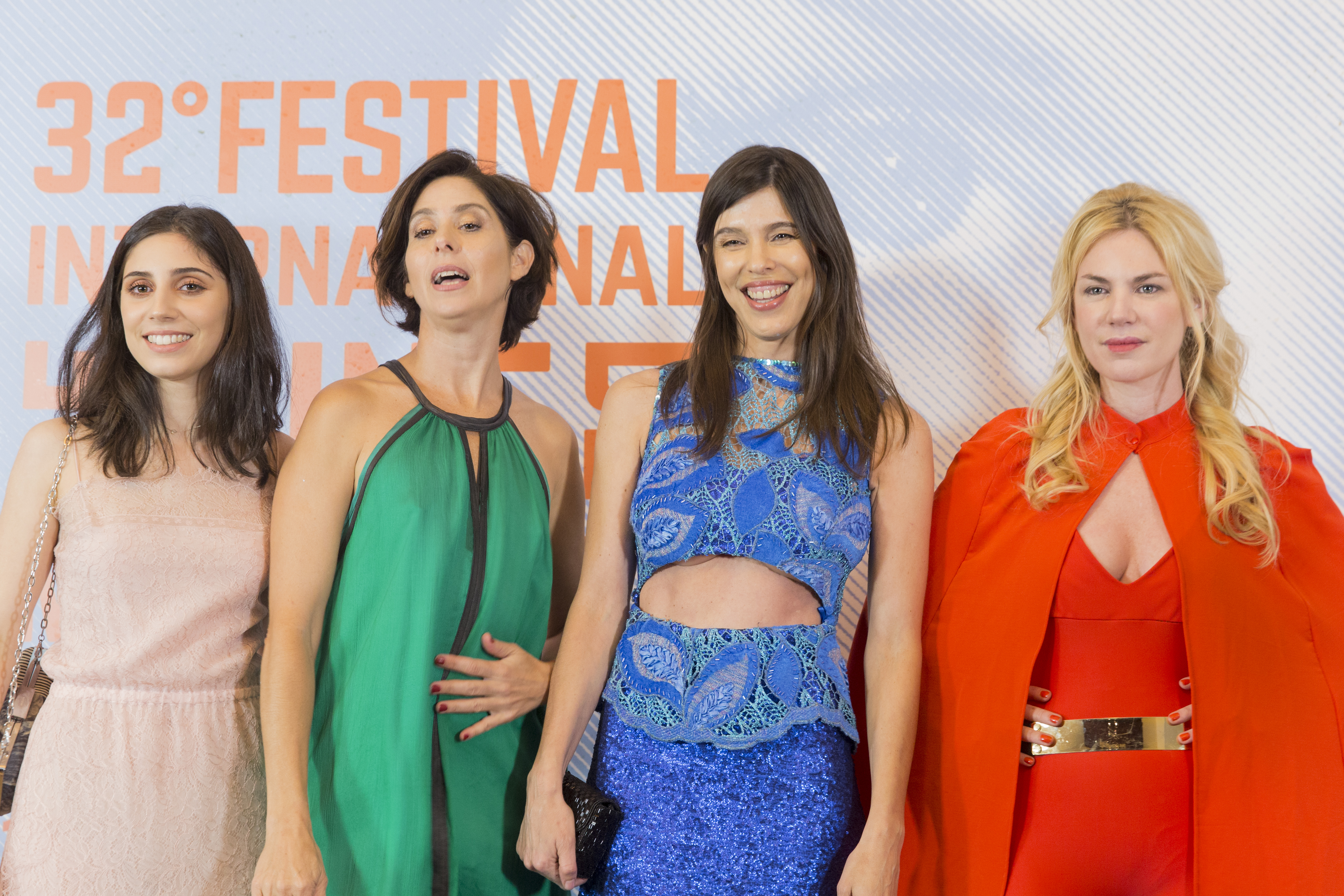 Mar del Plata, 17 de Noviembre de 2017.- Inauguró el 32º Festival Internacional de Cine. Foto: Soledad Amarilla / Ministerio de Cultura de la Nación Argentina.